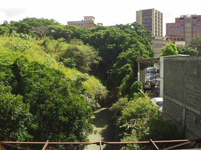 Quebrada de Baruta Caracas - Venezuela Nota: Tomé la imagen de esta fuente Venciclopedia: Quebrada de Baruta.jpg se señala lo siguiente: Esta imagen ha sido liberada al dominio público por su autor. Esto aplica en todo el mundo, pero en algunos países esto no es posible, si ese es el caso: el autor concede a cualquier persona el derecho de usar este trabajo para cualquier propósito, sin condiciones, a menos que dichas condiciones sean requeridas por la ley.